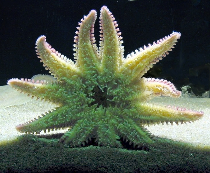 Starfish